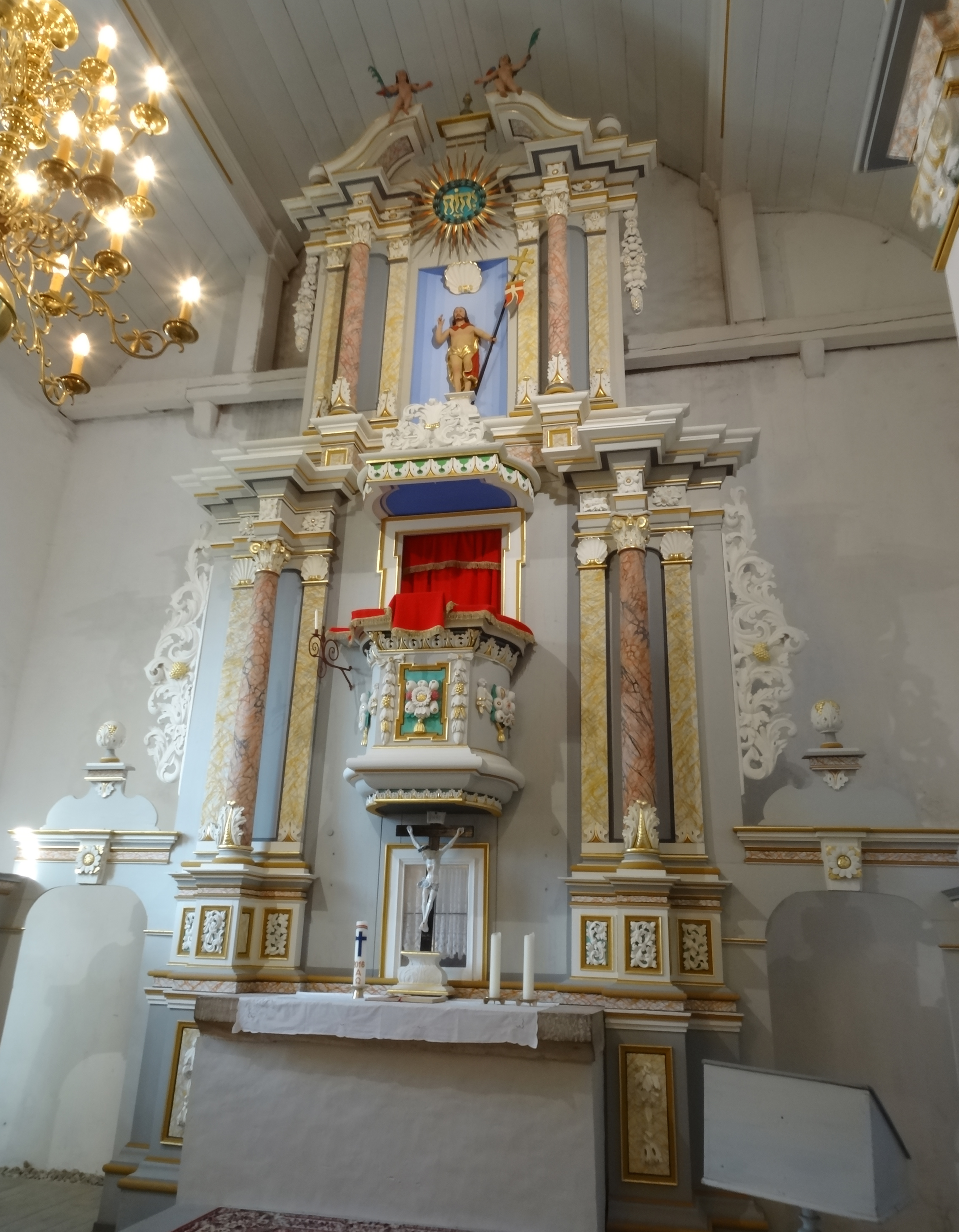 Kanzelaltar in Niedernissa Zur Himmelspforte